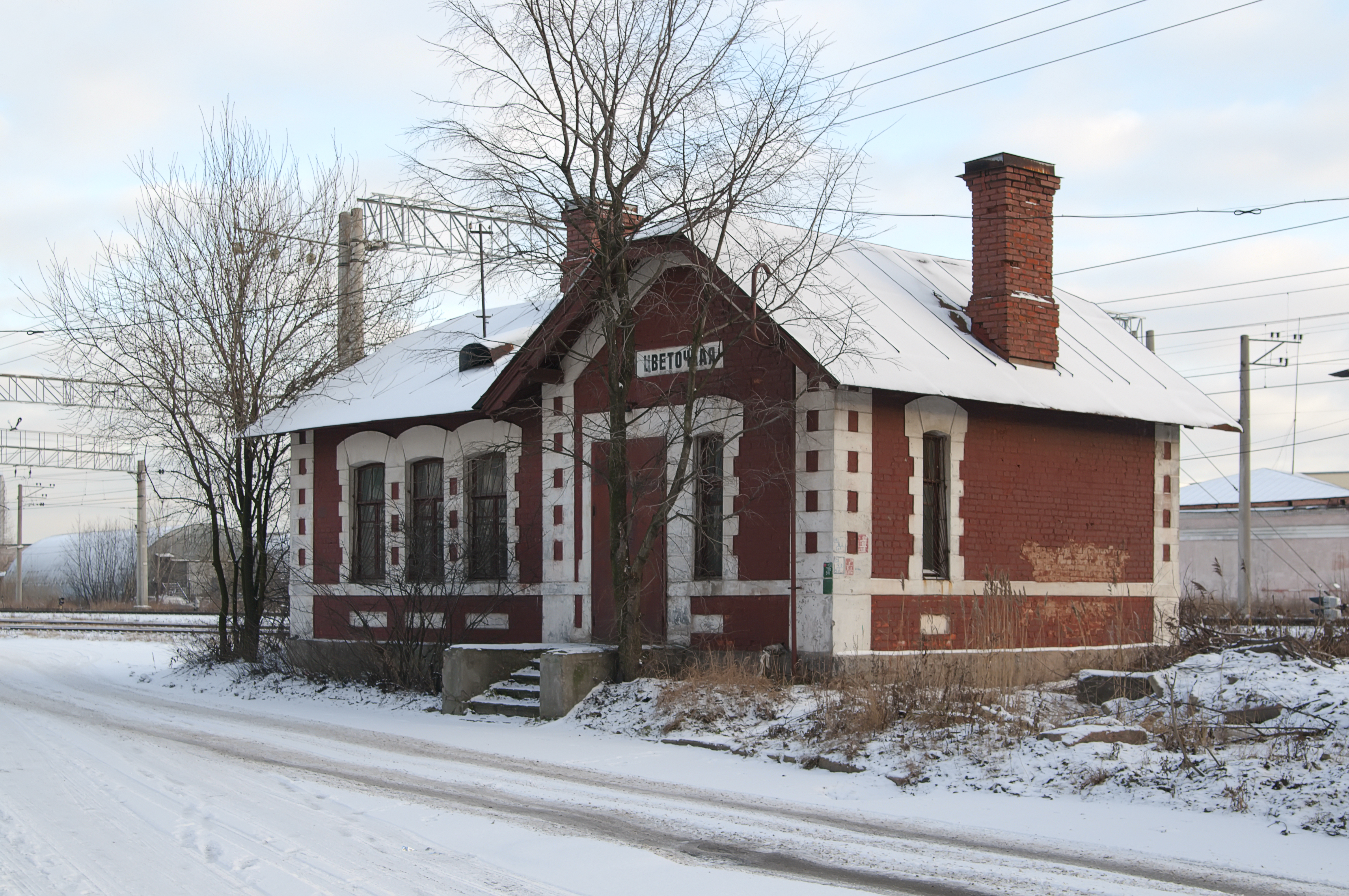 Пост "Цветочный" Николаевской железной дороги, откуда в марте 1918 г. отправился поезд, на котором Советское правительство переехало из Петрограда в Москву (см. мемуары Павла Малькова «Записки коменданта Кремля» (1959 г.))